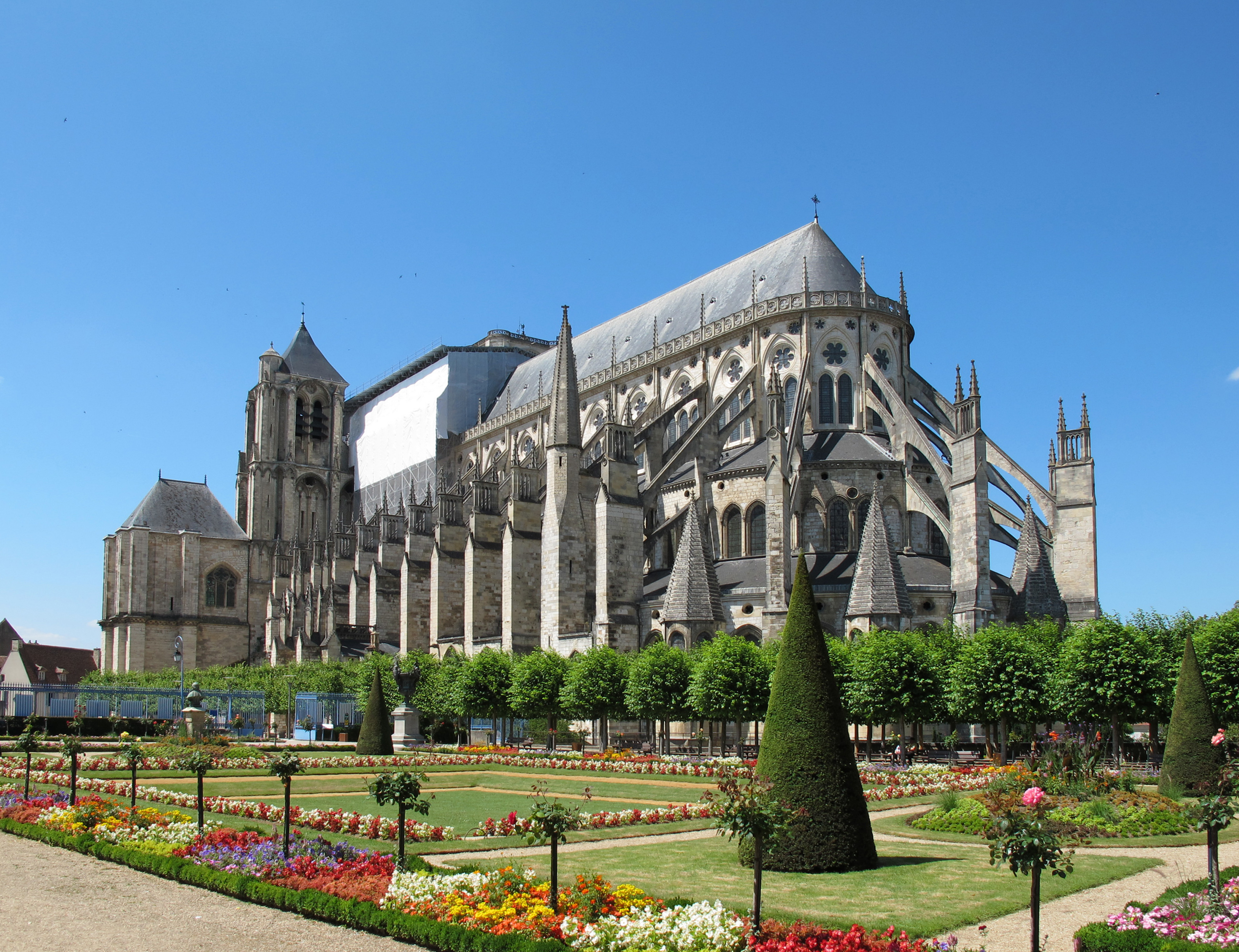 Cette cathédrale aux dimensions exceptionnelles est une œuvre majeure de l’architecture gothique. Elle est classée au patrimoine mondial de l’UNESCO depuis 1992. Elle mesure 118m de long, 41m de large, 37m de haut sous la voûte de la nef centrale et 5900m² de superficie soit 400m² de plus que Notre Dame à Paris.